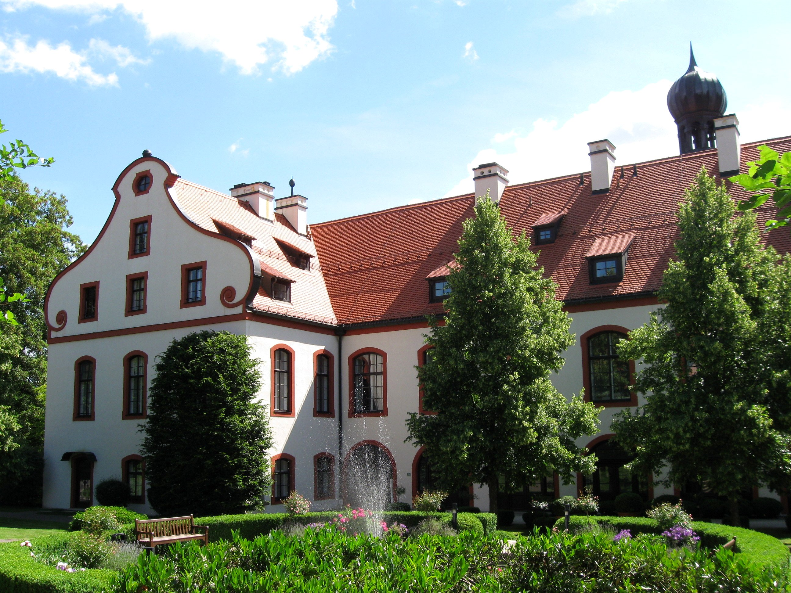 Schloss Eurasburg, zwei- bzw. dreigeschossiger putzgegliederter Dreiflügelbau in Spätrenaissanceformen mit vortretendem Mittelturm, seitlichen Zwiebeltürmen und ehem. Schlosskapelle, von Peter Candid, 1626-30, 1866 neutgotische Umgestaltung, 1908 Wiederherstelllung des ursprünglichen Zustands, nach Brand 1976 Wiederaufbau und Aufteilung in Einzelwohnungen; mit Ausstattung; Nebengebäude, zweigeschossiger putzgegliederter Neubarockbau mit Zwiebel-Eckturm, 1905; Einfriedung, Ummauerung mit Toren.